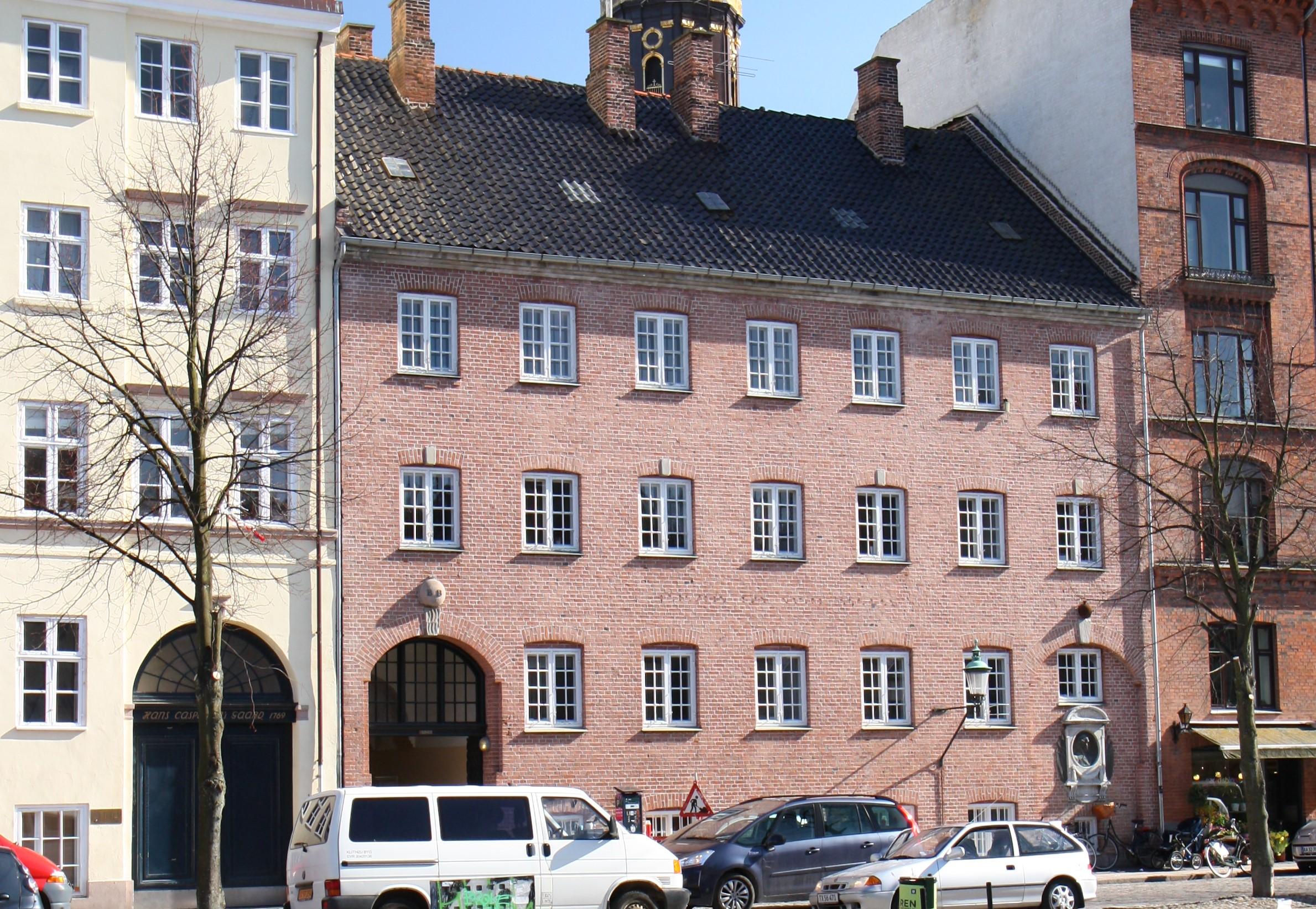 Bombebøssen in Christianshavn, Copenhagen, Denmark